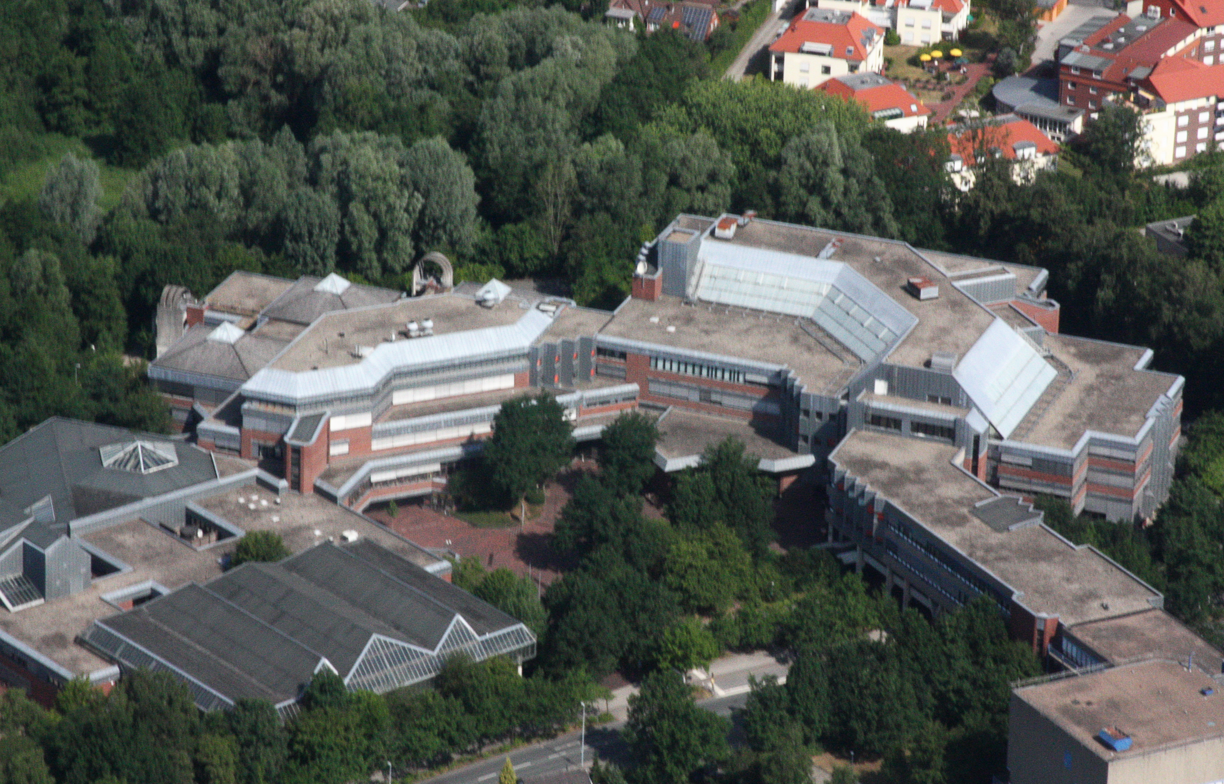 Luftaufnahmen Oldenburg (Oldenburg), mit Weiterflug nach Westen; 1500 Fuß Flughöhe; Juli 2010; Originalfoto bearbeitet: Tonwertkorrektur und Bild geschärft mit Hochpassfilter